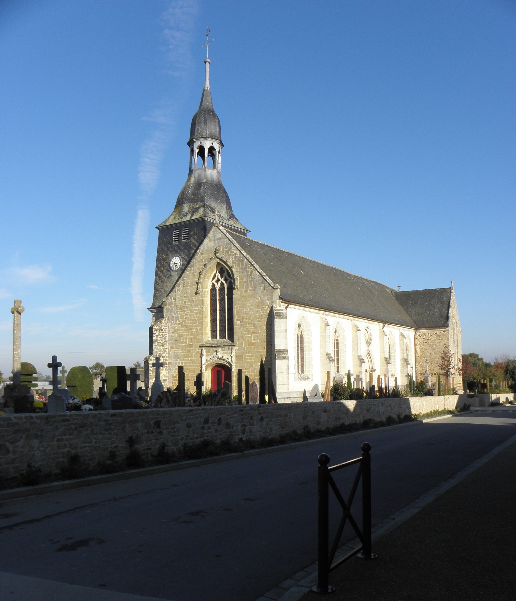 Église Saint-Médard de Torcé (35). Façade occidentale et flanc sud.